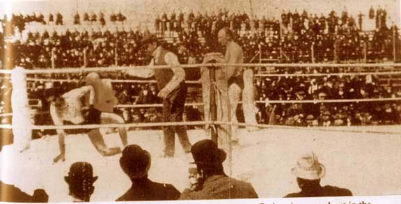 17. mars 1897 Arenabilde Bob Fitzsimmons vs. James J. Corbett. Knockout.